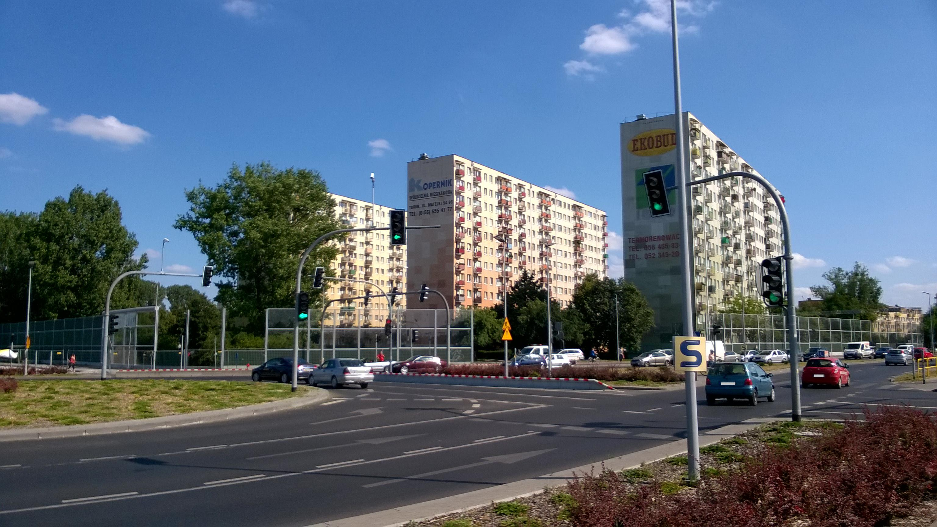 Trasa Średnicowa Północna w Toruniu0